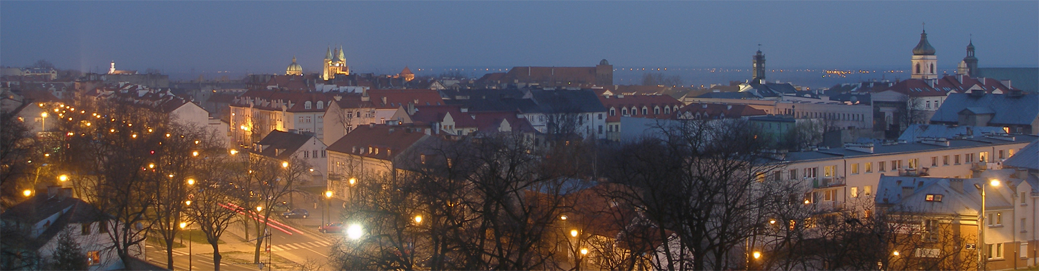 Panorama płockiej Starówki